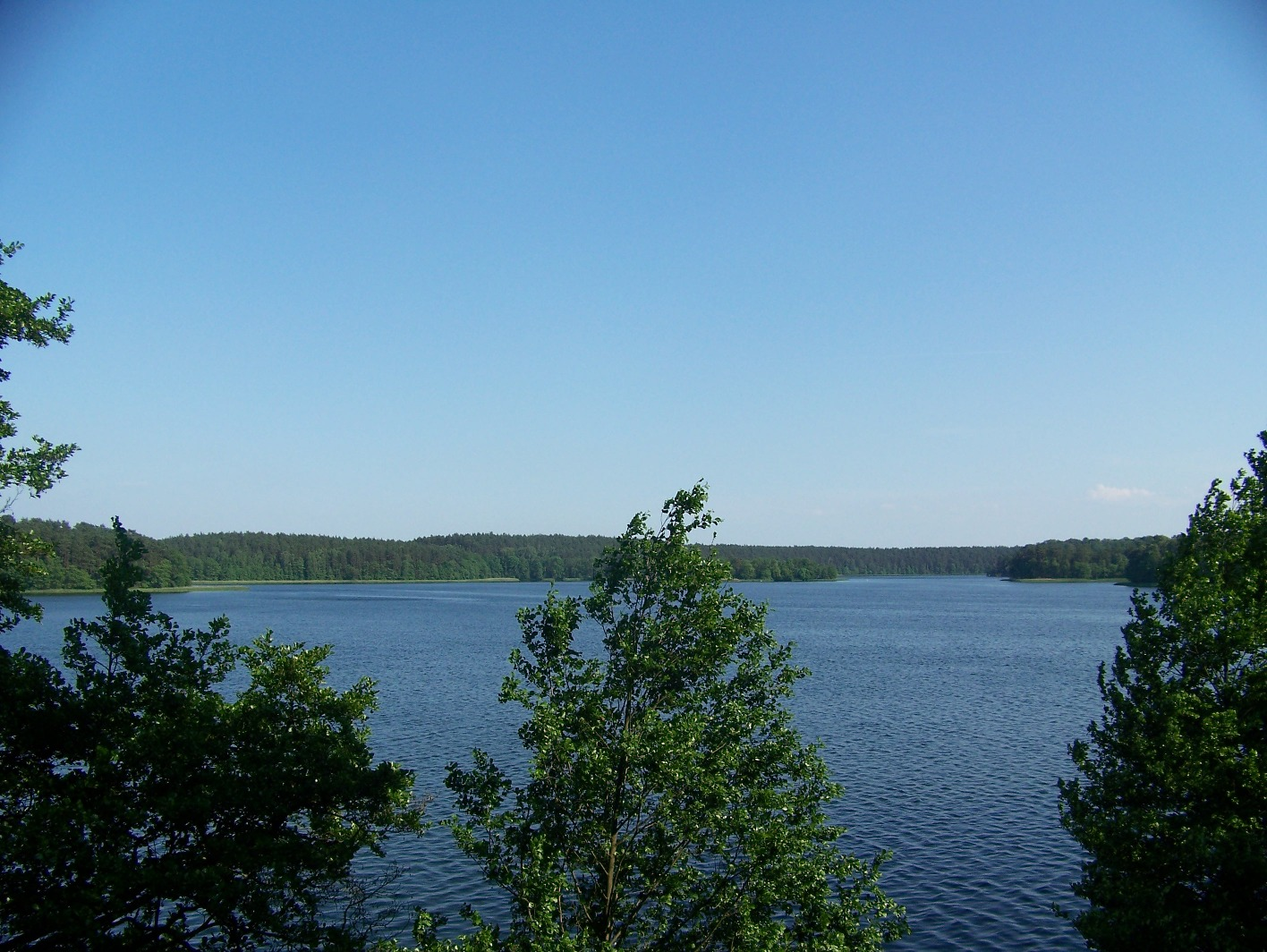 Widok z Kanału Sicieńskiego (północno-zachodni brzeg j. Ostrowieckiego) w głąb jeziora Ostrowieckiego, Drawieński Park Narodowy